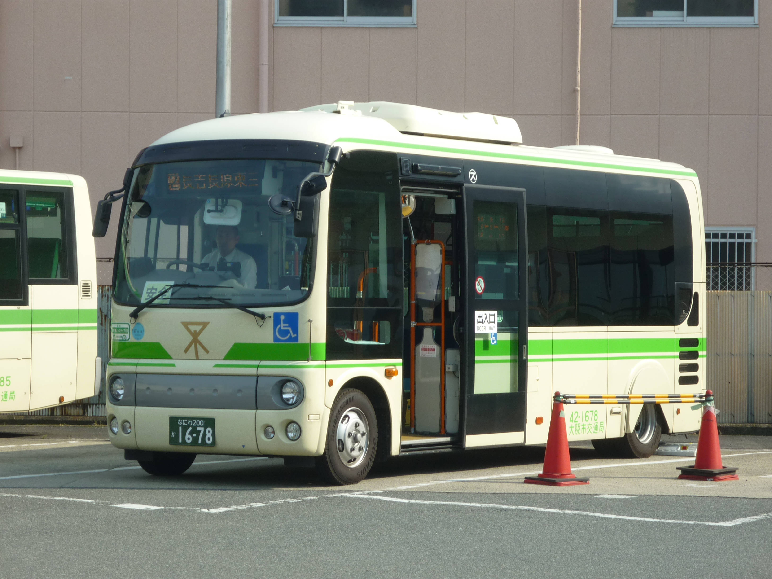 大阪市営バス 出戸バスターミナルにて撮影